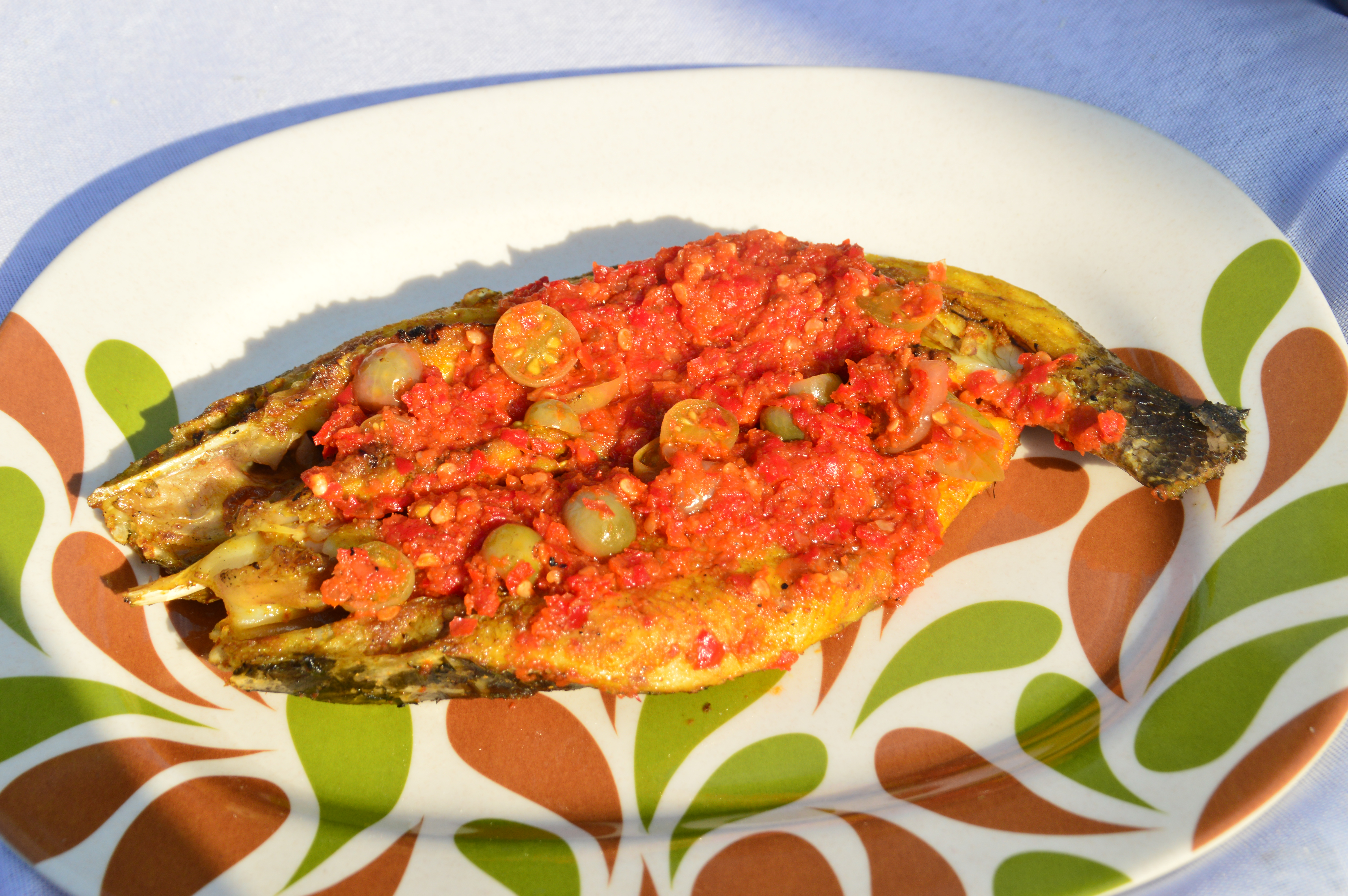 Gence ruan, masakah khas Kutai, Kalimantan Timur, yang terbuat dari ikan gabus (ruan) dan diberi sambal yang disebut gence.